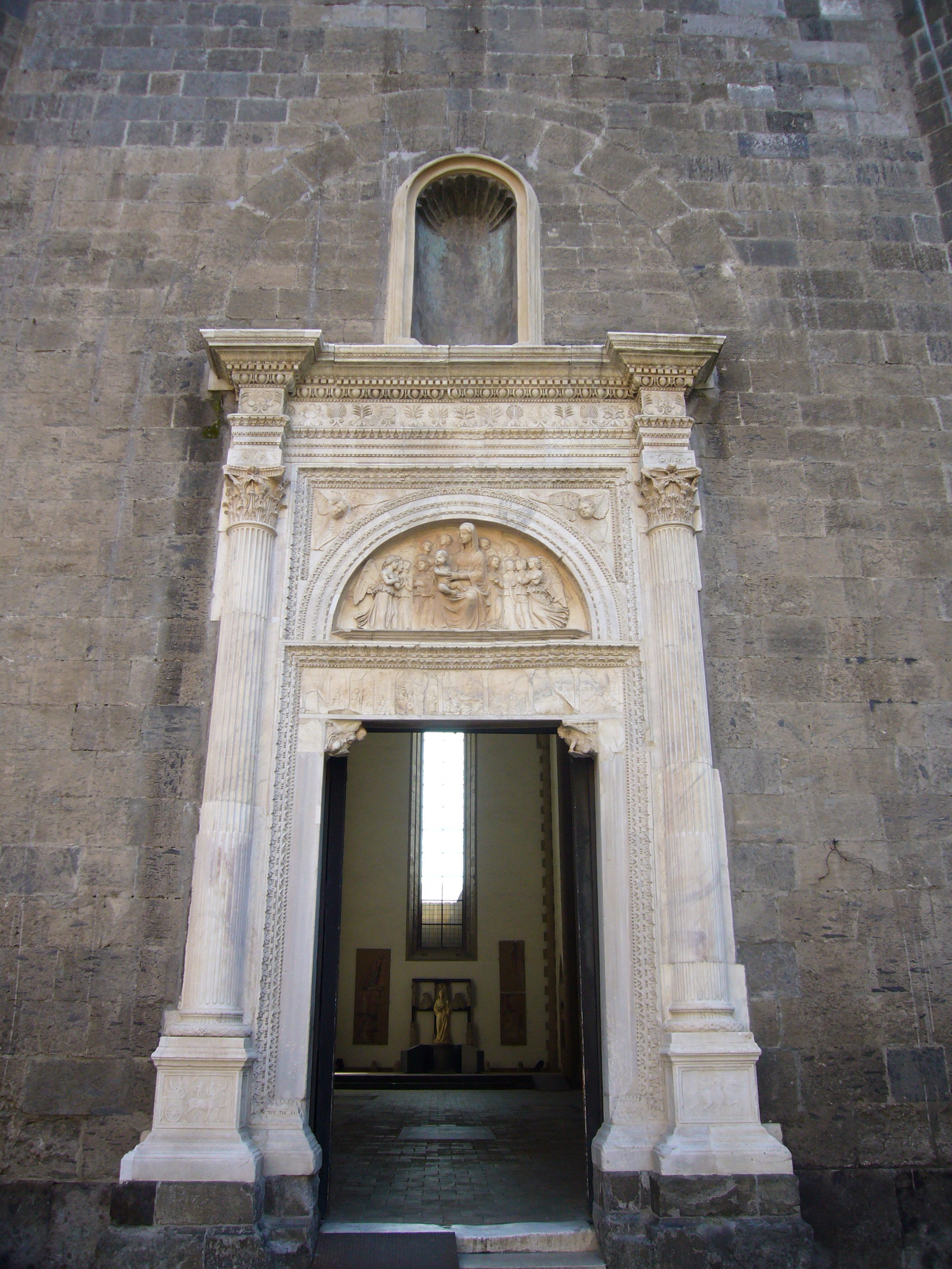 Napoli, Cappella palatina: portale di Andrea dell'Aquila (XV sec.)